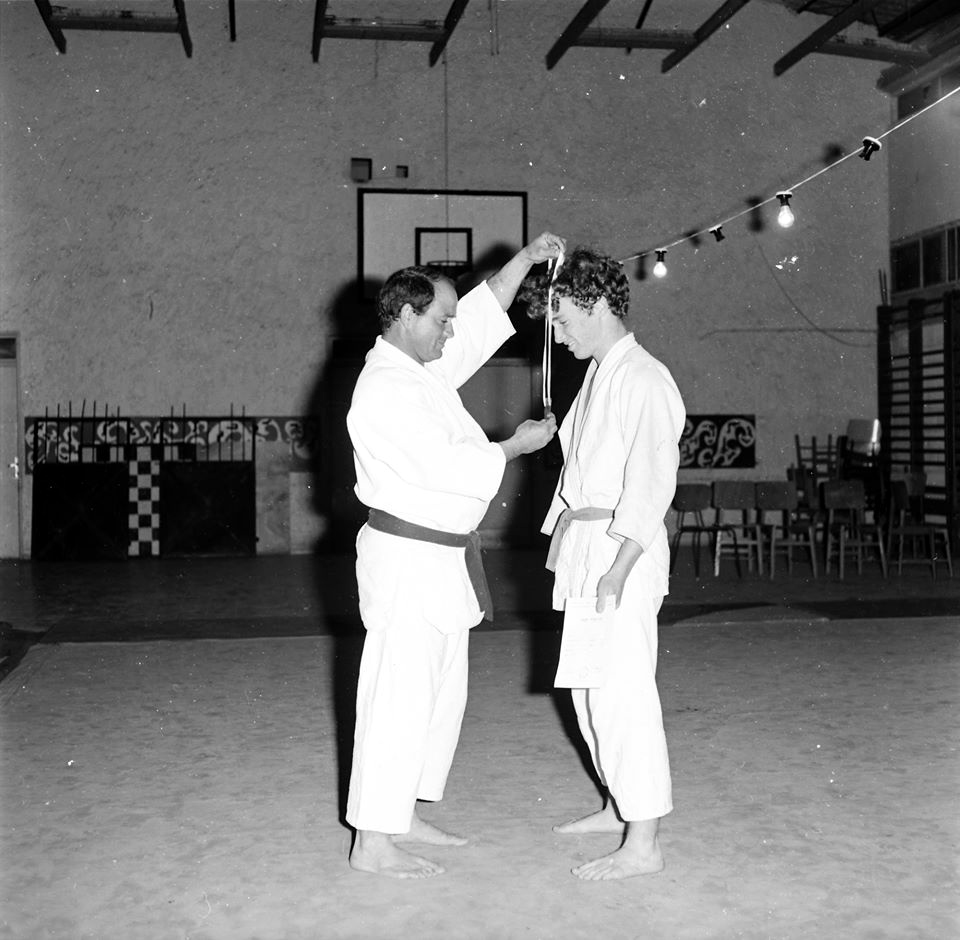 מוריס סמדג'ה מעניק מדליה לחניך מצטיין